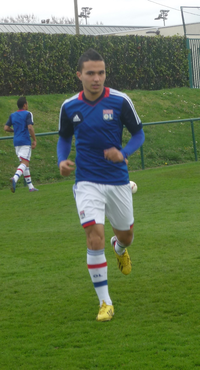 Zakarie Labidi, joueur de l'Olympique lyonnais, à l'entrainement en avril 2013